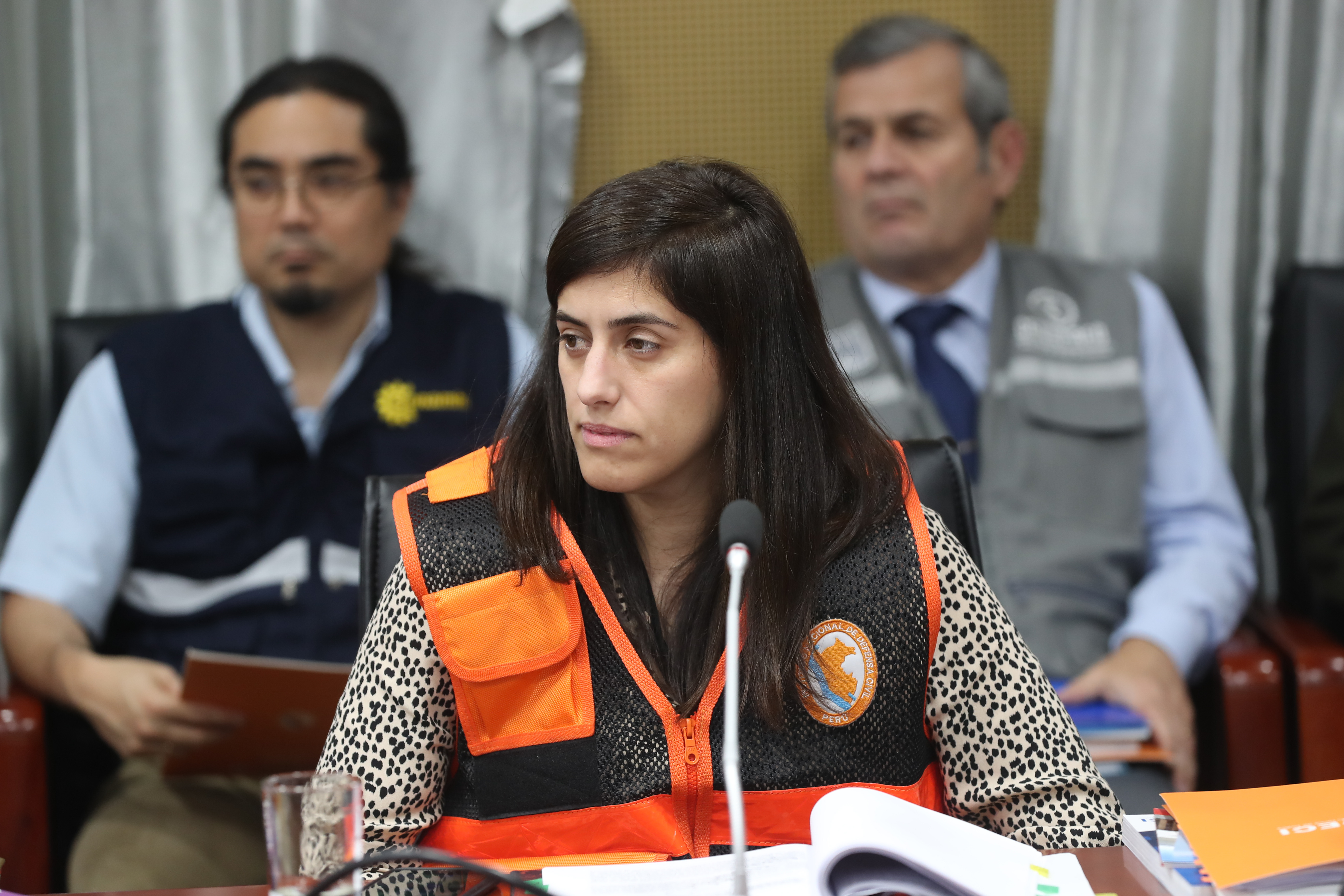 PRESIDENTE DE LA REPÚBLICA SUPERVISÓ SIMULACRO DE SISMO Y PRESIDIÓ REUNIÓN DEL CONAGERD